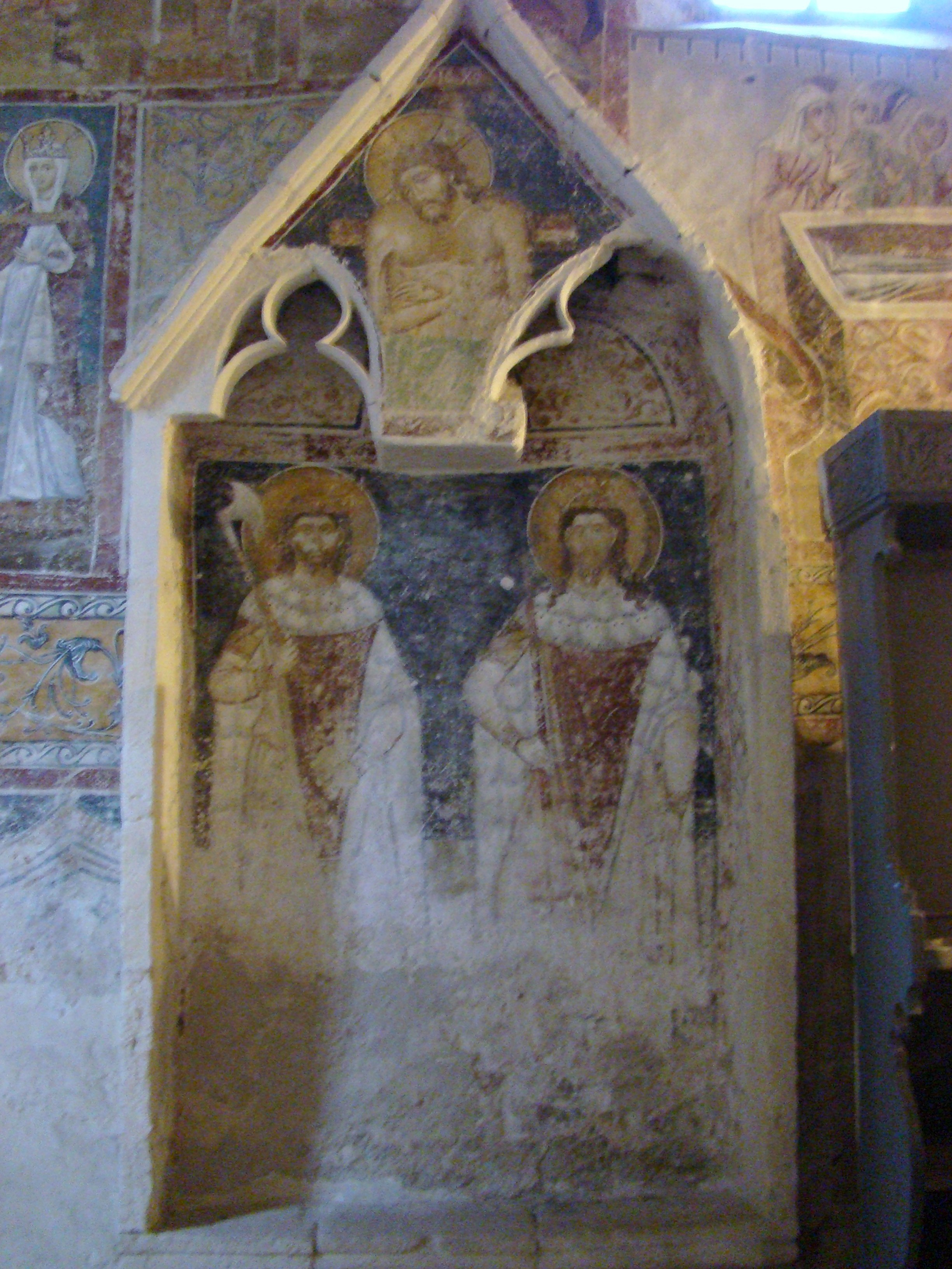 Biserica evanghelică, sat DÂRLOS; comuna DÂRLOS, județul Sibiu